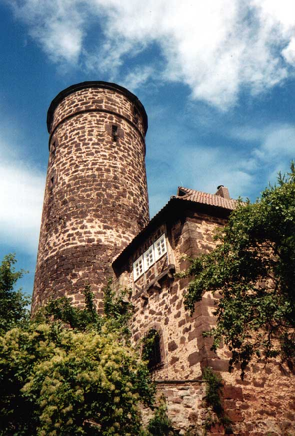 Blick auf den Turm von Burg Ludwigstein von Südwesten betrachtet